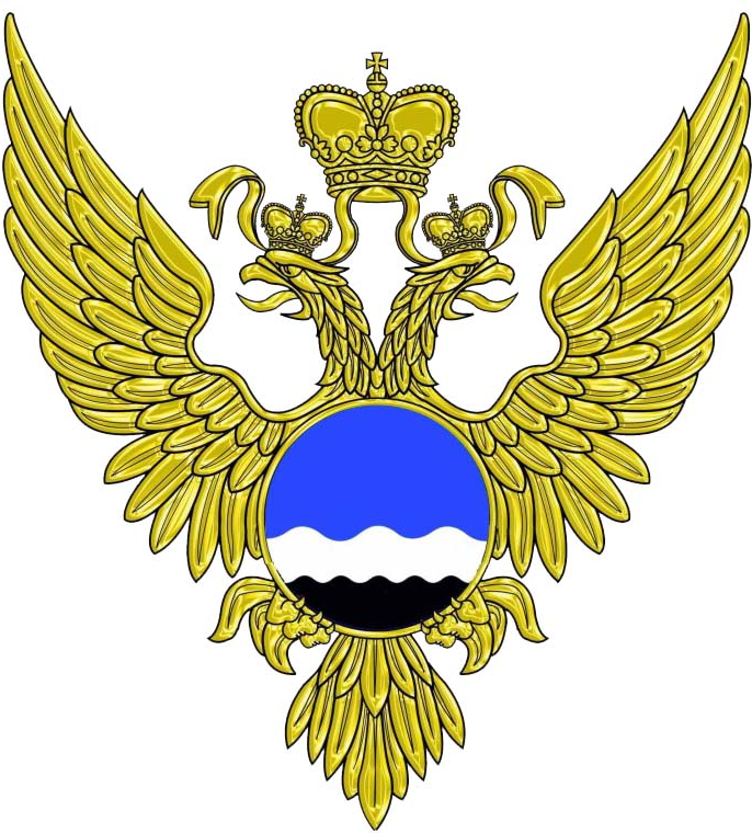 Эмблема Федеральной службы по гидрометеорологии и мониторингу окружающей среды Многоцветный вариант